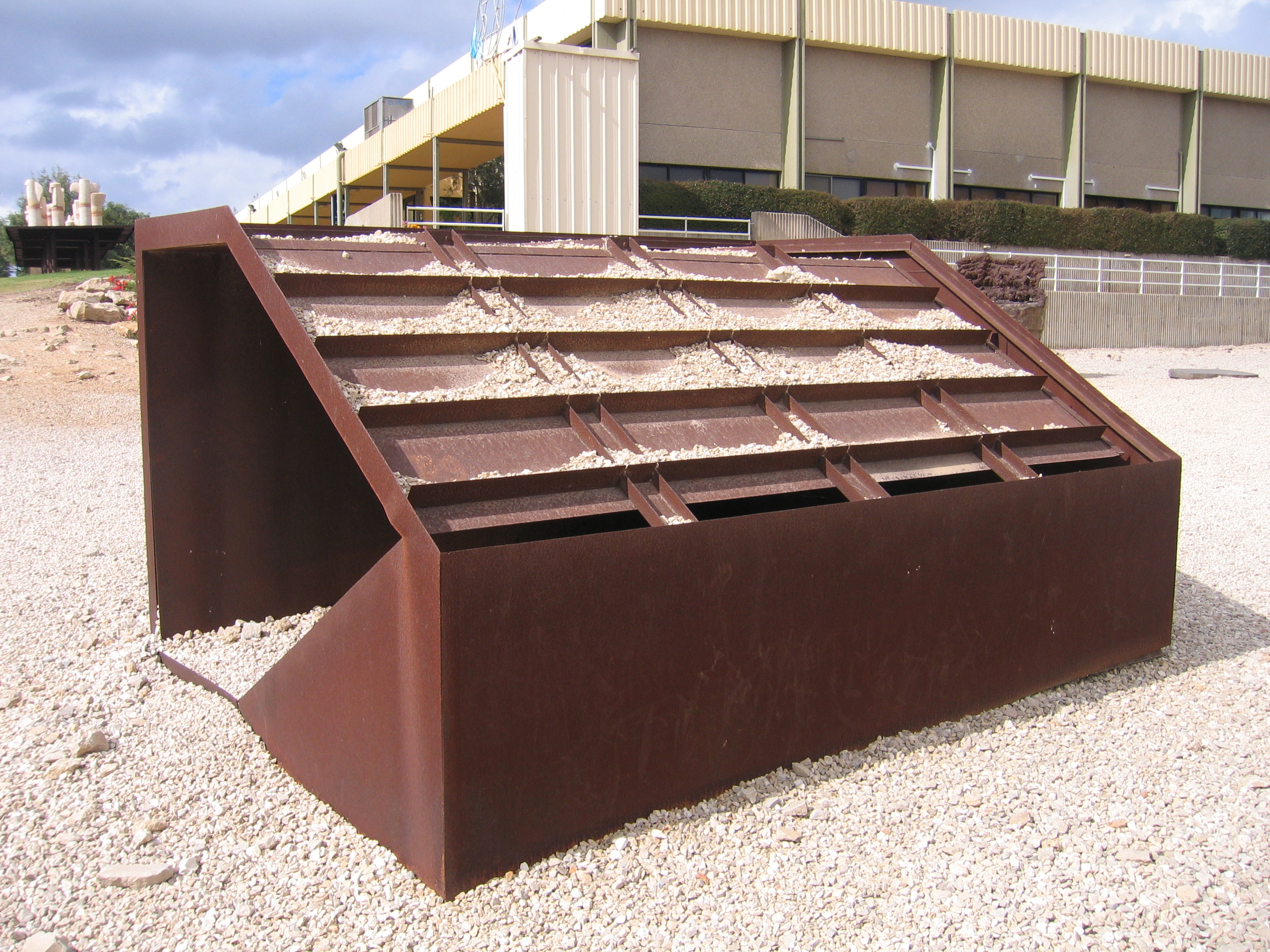 Sculpture